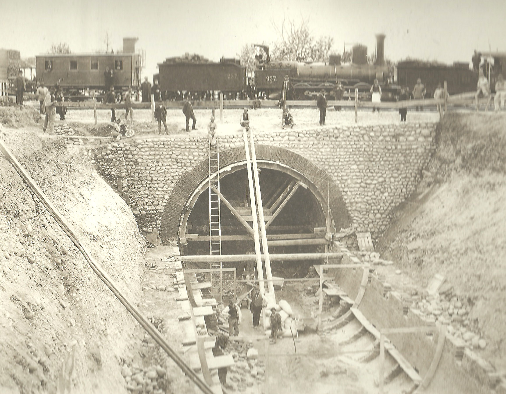 Costruzione del Canale Camuzzoni a Verona. Deviazione provvisoria della ferrovia Milano-Venezia e costruzione del sottopassaggio sulla stessa